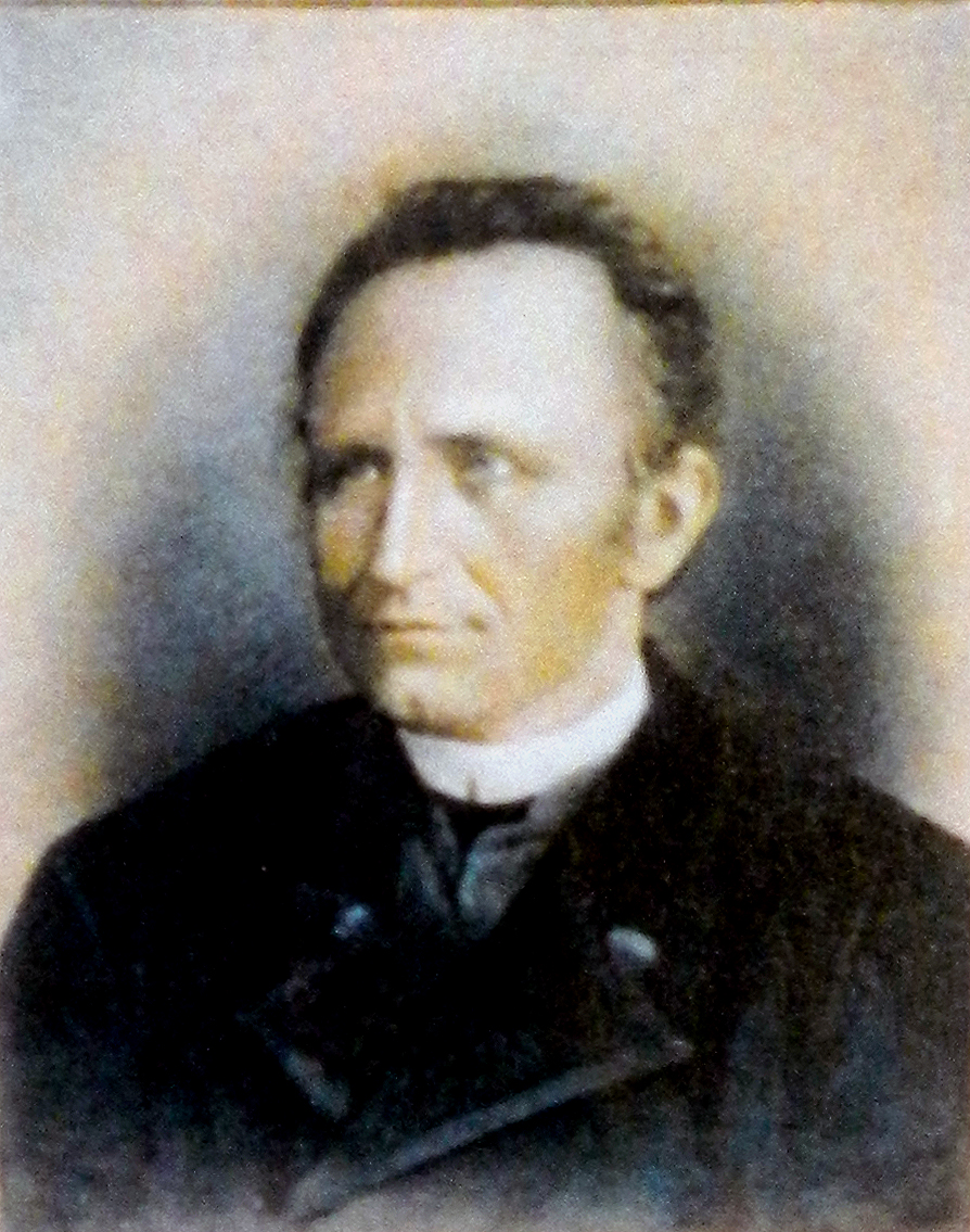 Josef Souhrada, Priester und Schriftsteller Kucera 1838 - Chudenitz 1892